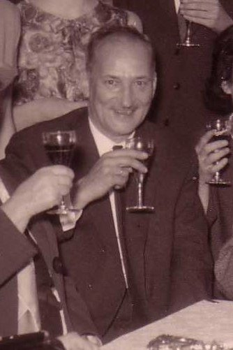 Paul Ledoux (1914-1988), professeur d'astrophysique à l'Université de Liège.